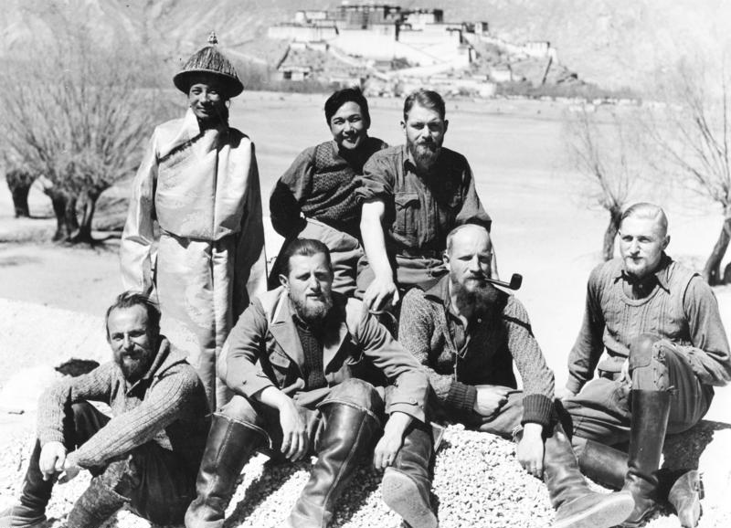 Tibetexpediton, Expeditionsteilnehmer Lhasa, Expeditionsgruppenaufnahme mit Potala im Hintergrund [Von links nach rechts: (stehend) Rabden Khazi, Kaiser Bahadur Thapa, Schäfer; (sitzend) Krause, Geer, Wienert, Beger] Abgebildete Personen: Beger, Bruno Dr.: SS-Hauptsturmführer, Abteilungsleiter Sven-Hedin-Institut, Deutschland (GND 128720654) Schäfer, Ernst Dr.: SS-Sturmbannführer, Leiter des Sven-Hedin-Institutes, Deutschland (GND 123991420) Krause, Ernst: Mitarbeiter im Sven-Hedin-Institut, Deutschland